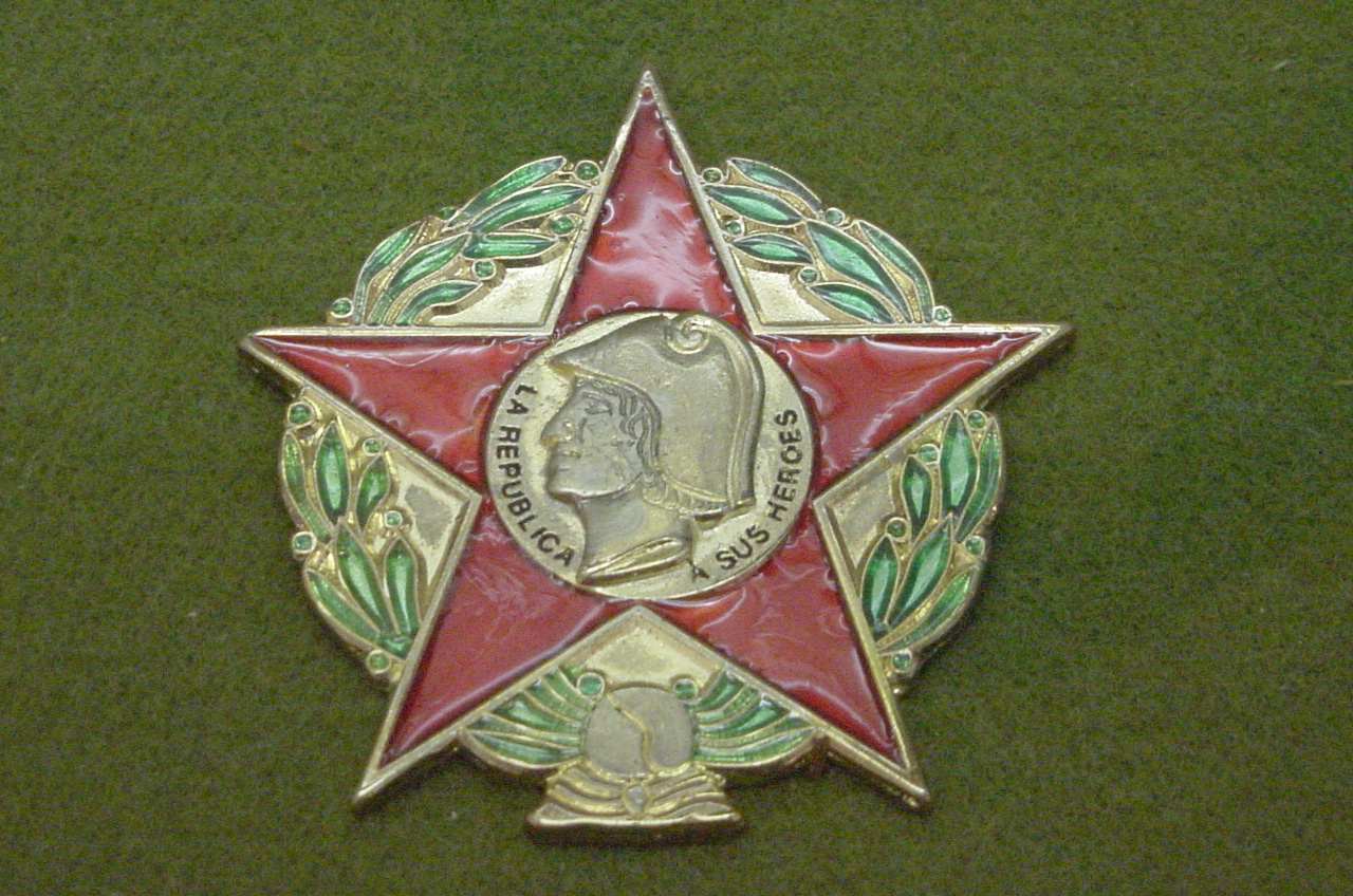 Laureada de Madrid. Máxima condecoracion al Valor de la República Española durante la Guera Civil 1936-1939